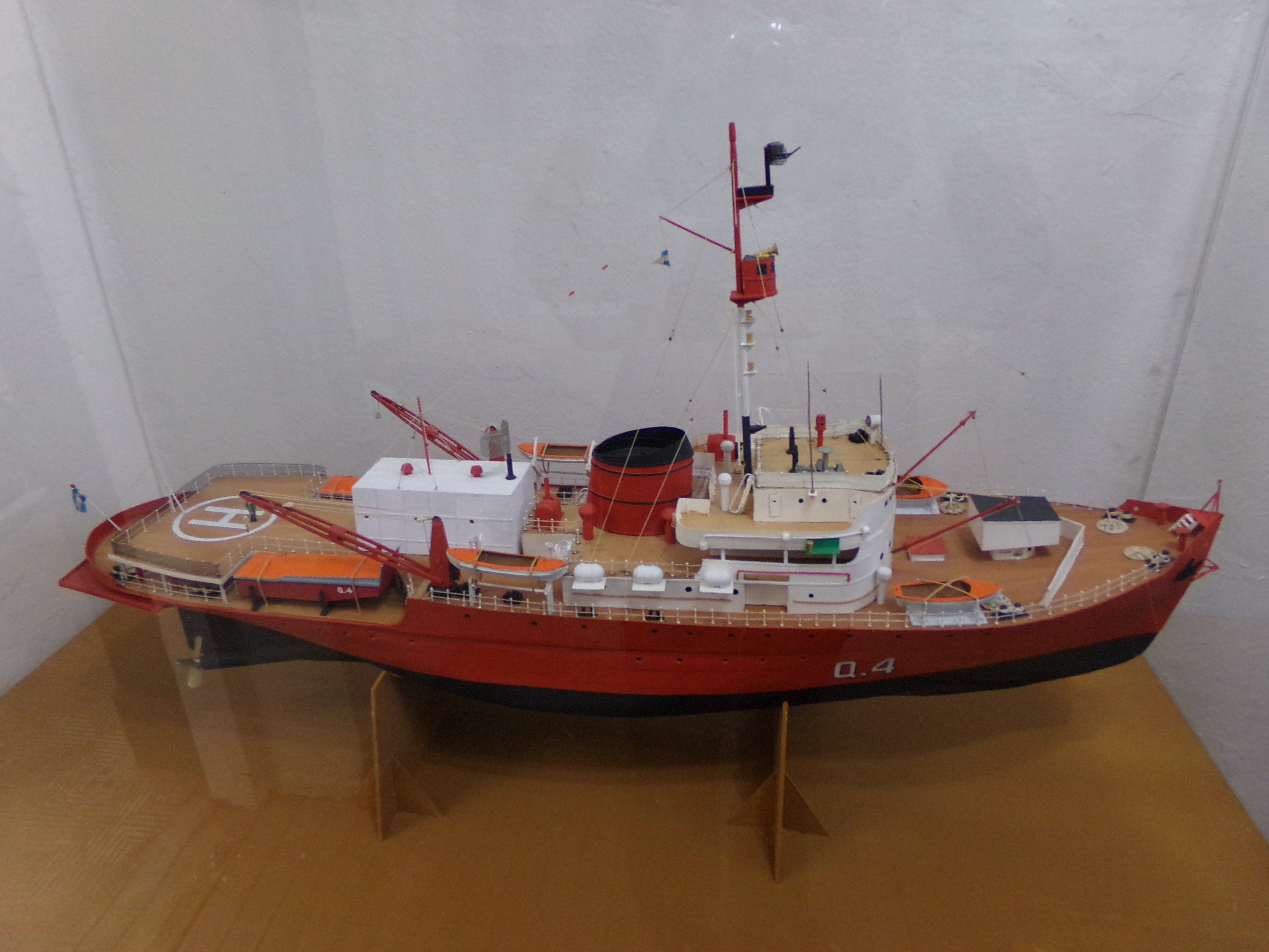 Museo Maritimo y Ex Presidio de Ushuaia, TDF, Arg